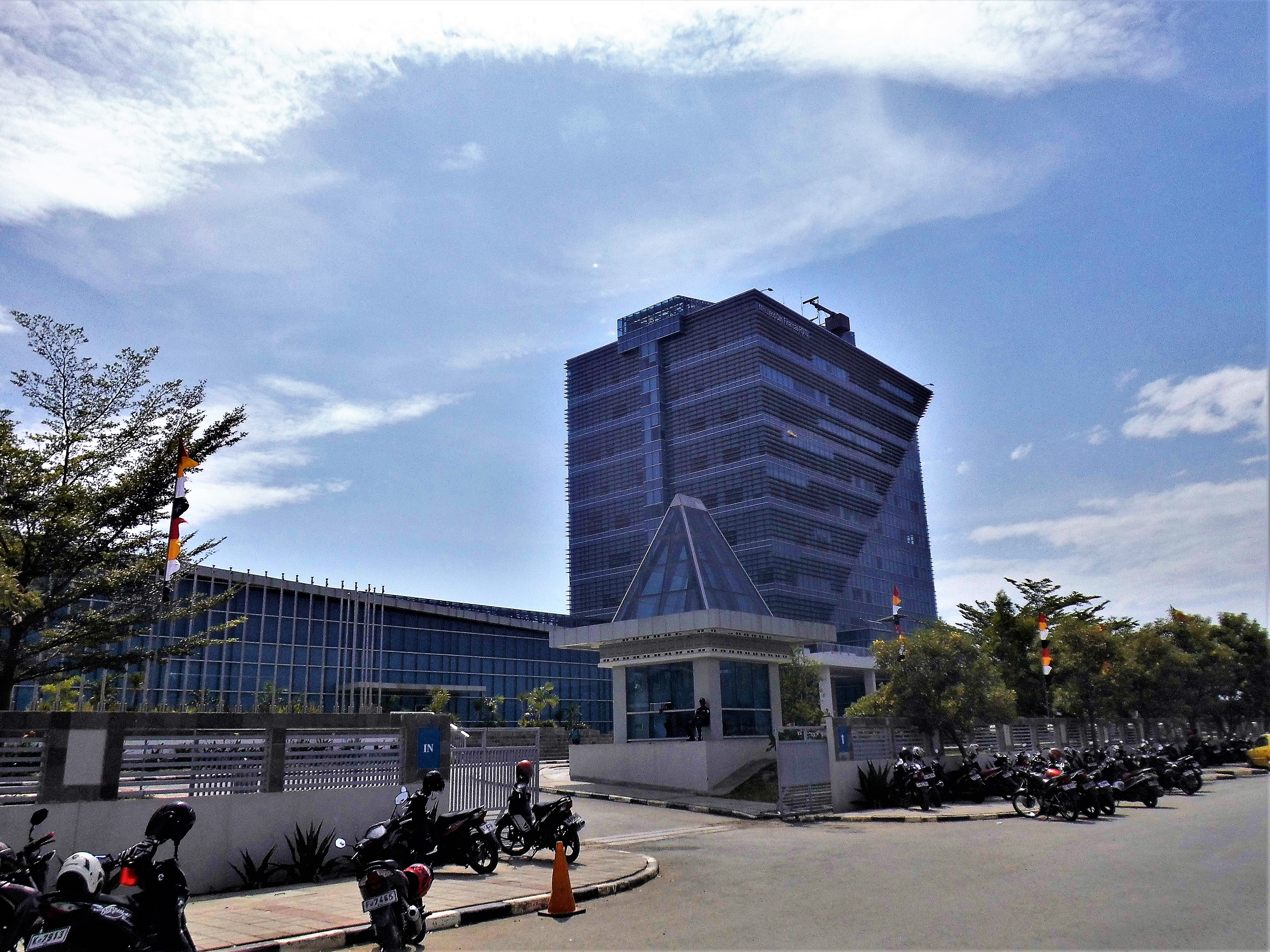 Finanzministerium, Dili, Osttimor